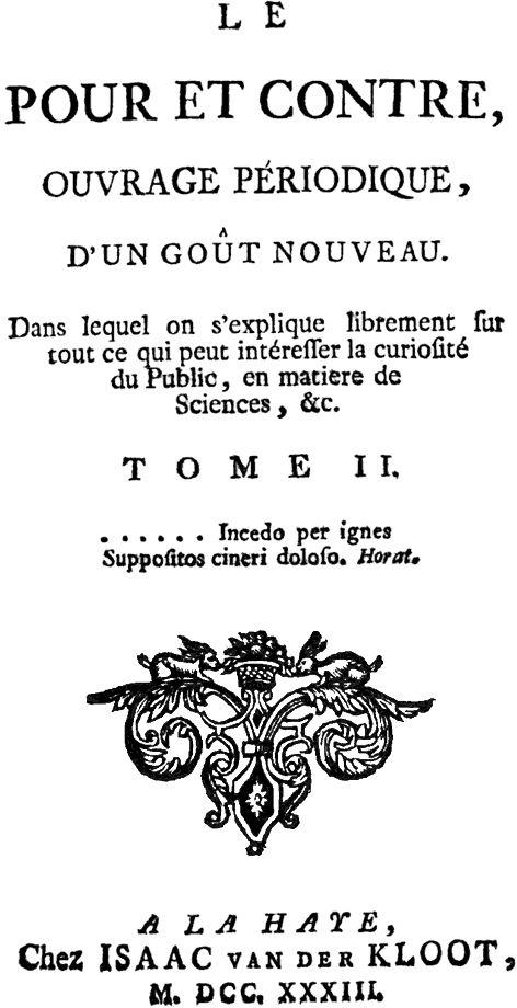 First page of Le Pour et Contre by Antoine François Prévost (1697-1763).